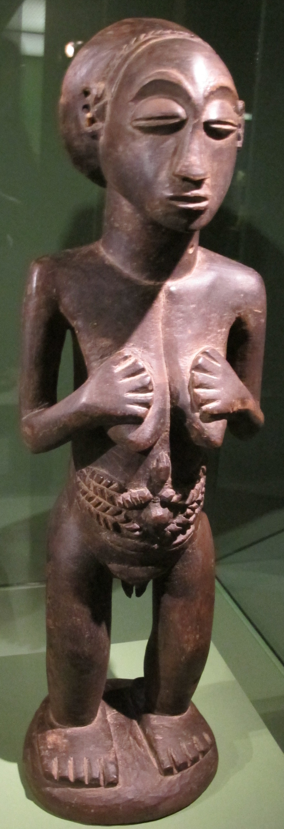 Congo, luba, statua, XIX sec.